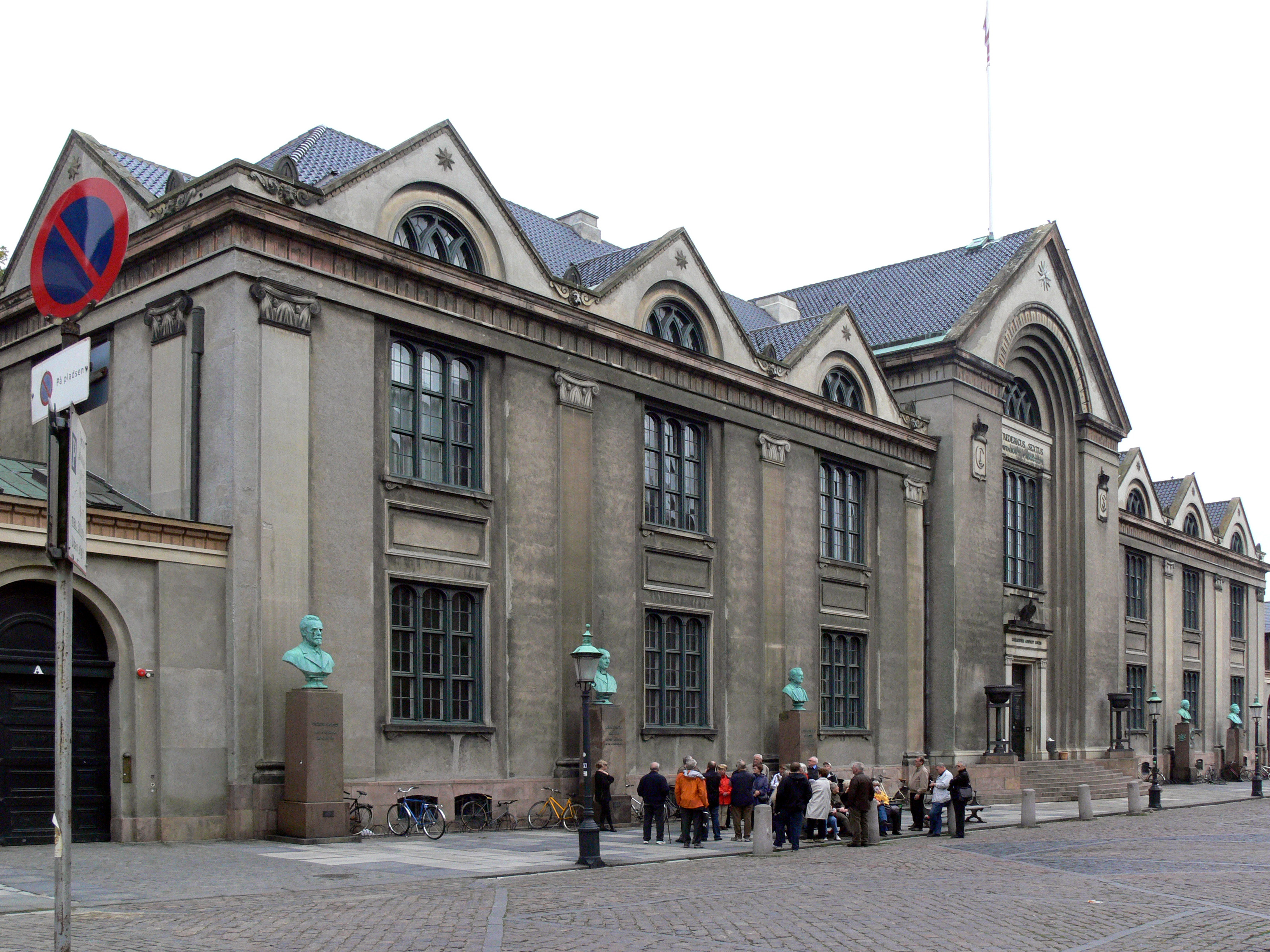 Universität von Kopenhagen.